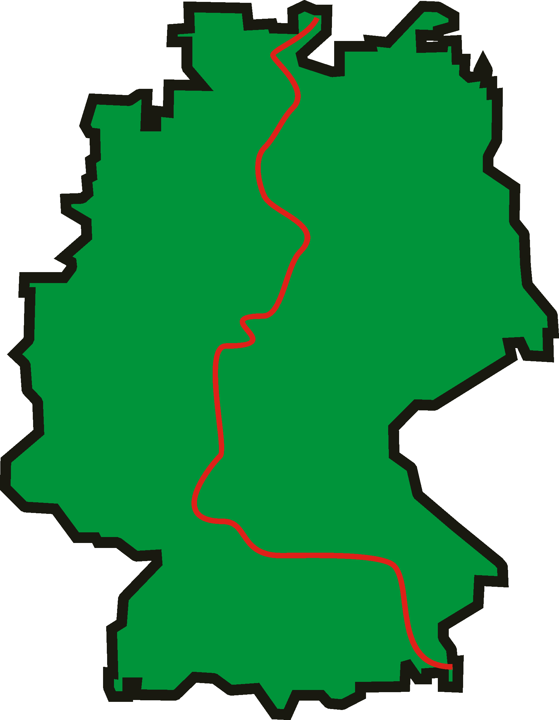 Karte der Ferienroute Alpen-Ostsee Fotograf: presse03, selbst erstellt Lizenz: GNU-FDL